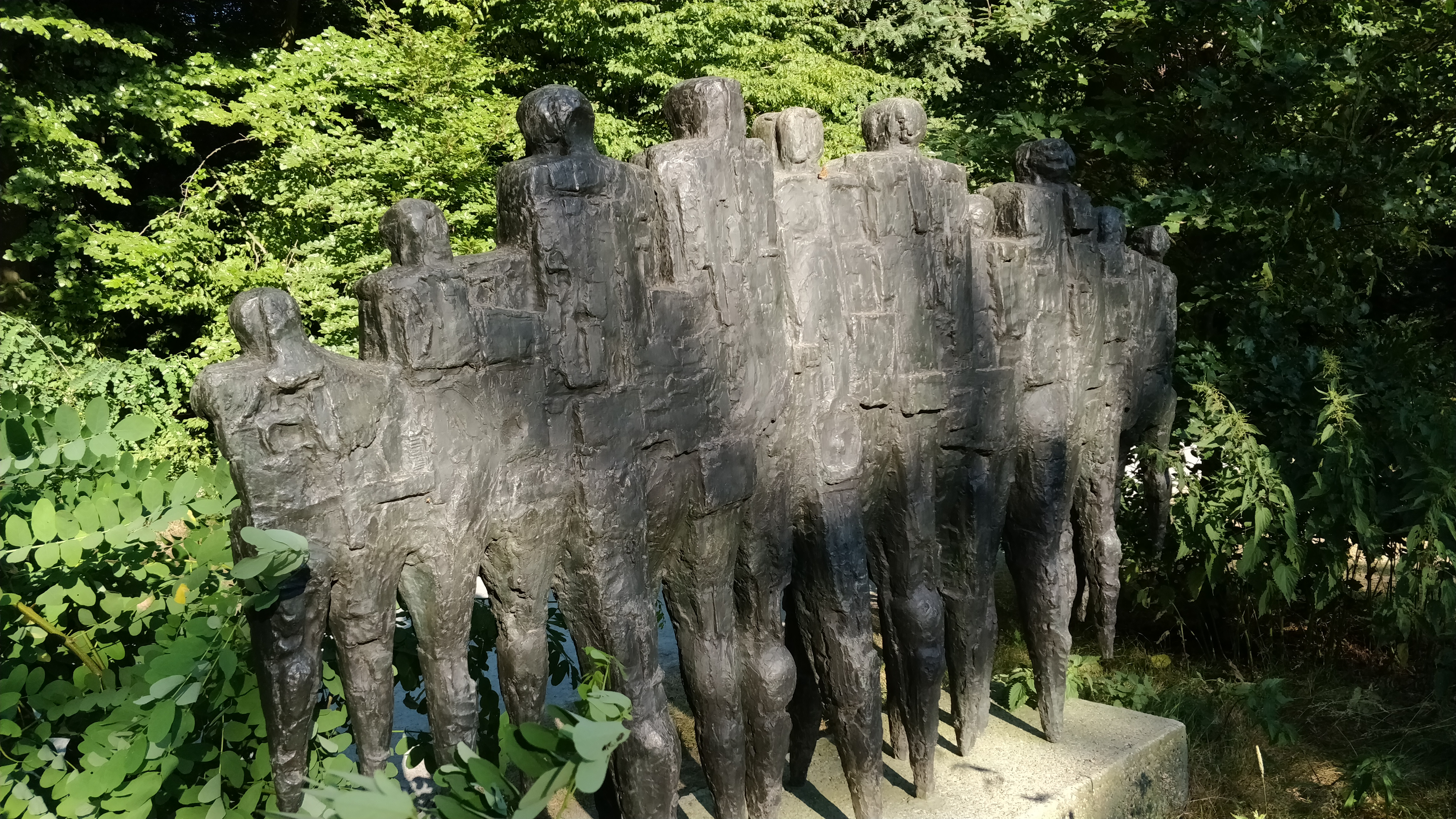 Achterzijde van Manifestanten, Drago Trsar, Middelheimmuseum